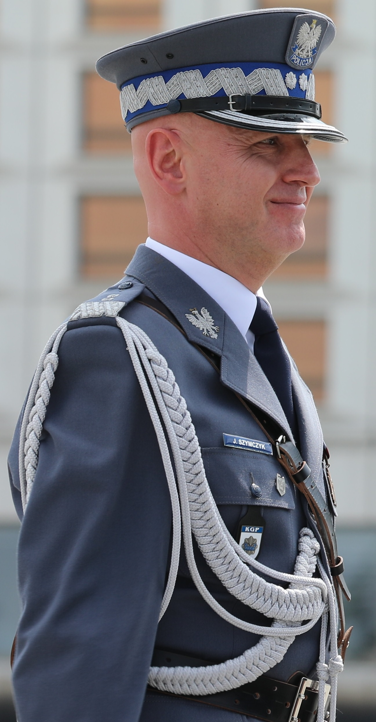 Komendant Główny Policji gen. insp. Jarosław Szymczyk podczas centralnych obchodów Święta Policji 2018